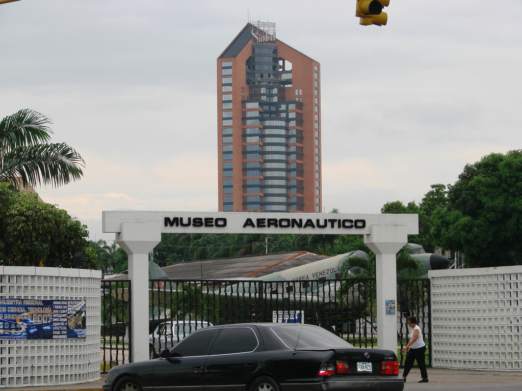 Entrada principal. Maracay. Estado Aragua. Venezuela.